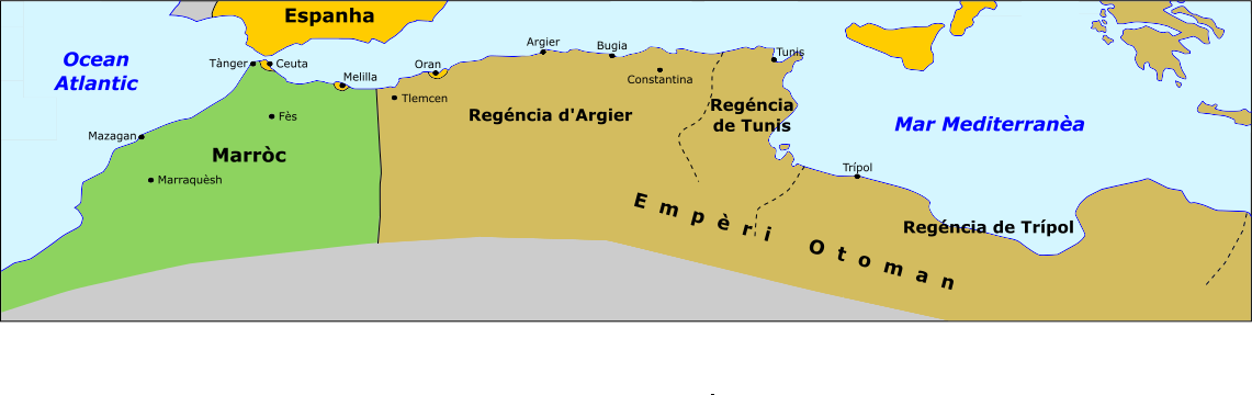 Magrèb en 1670.